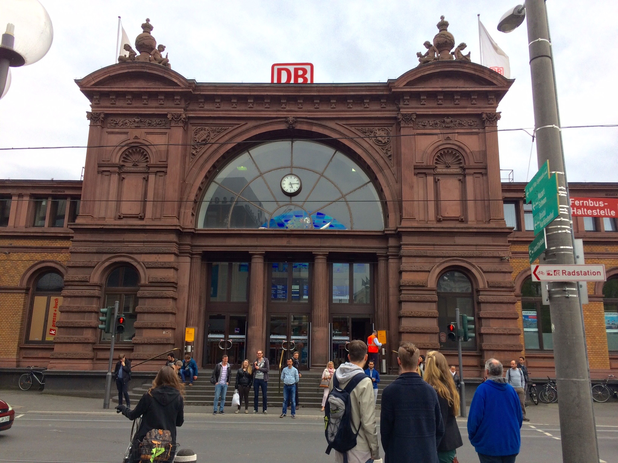 Das Gebäude des Bonner Hauptbahnhofs.